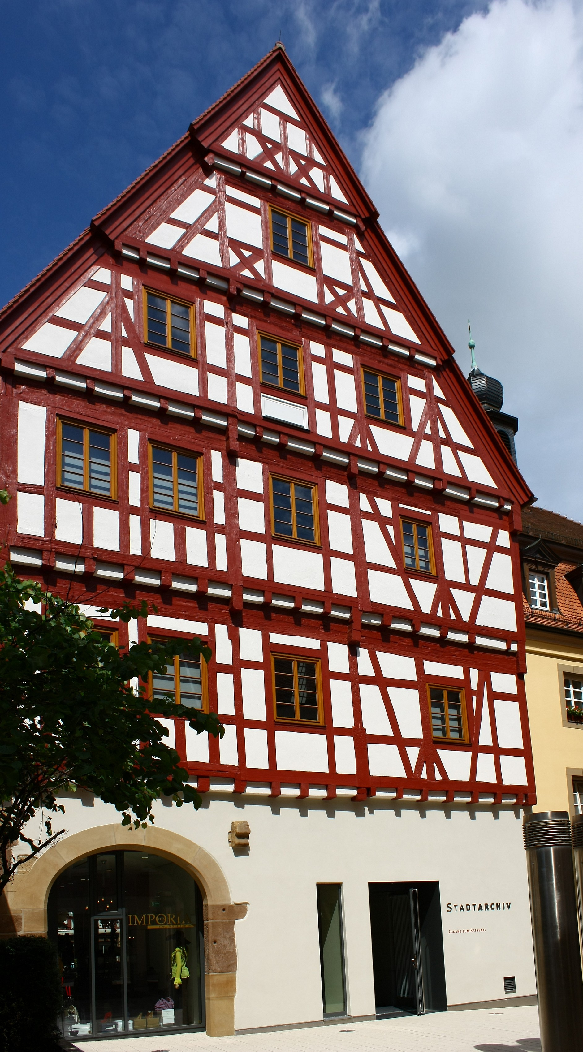 Eingang zum Stadtarchiv Neckarsulm an der Rückseite der Marktstraße 16 (der ehemalige Gasthof "Zur Rose"), direkt neben dem Rathaus, erbaut 1548, rekonstruiert 2007 bis 2009